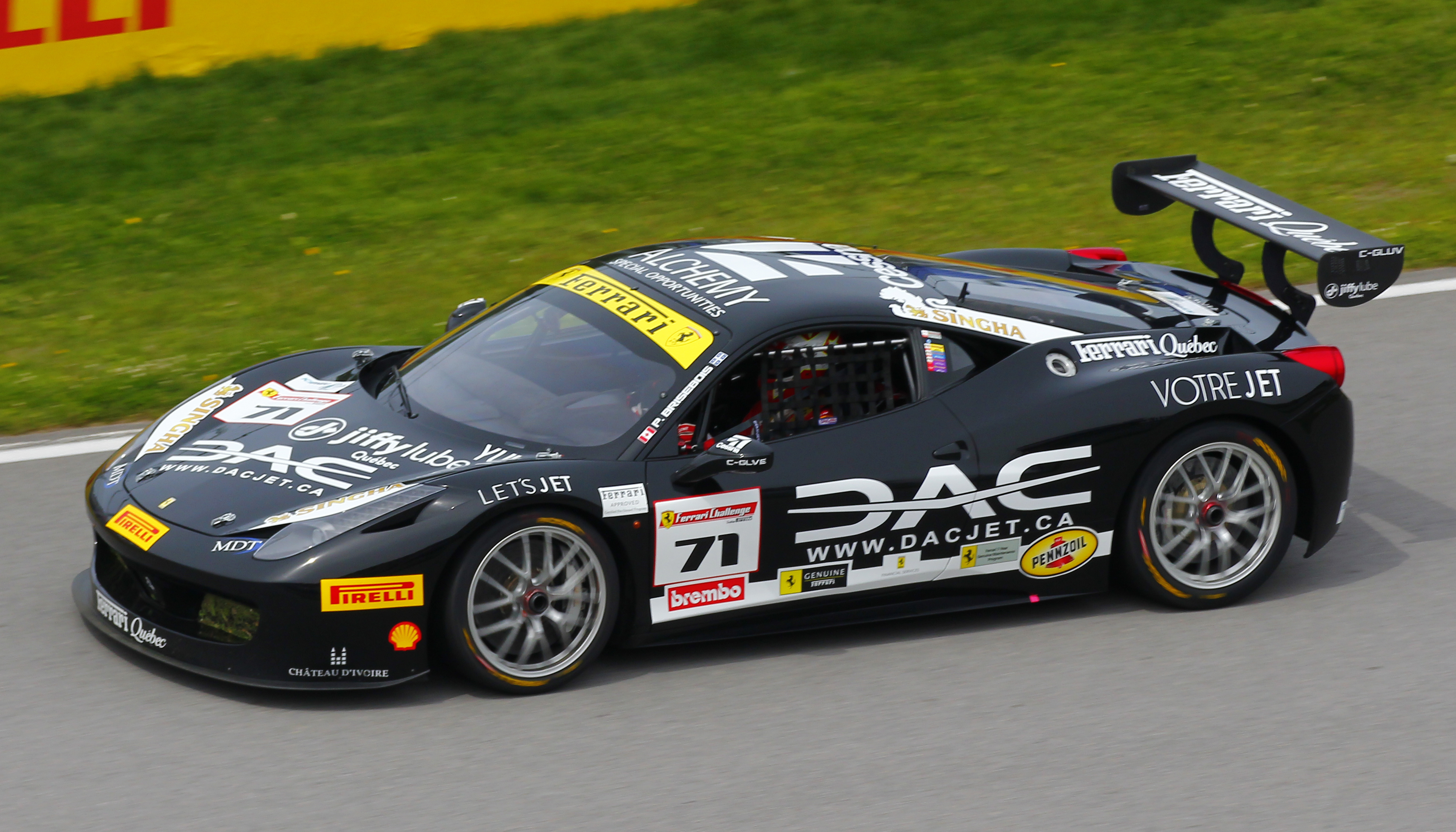 Patrice Brisebois - Challenge Ferrari - Circuit Gilles-Villeneuve - Montréal - Grand Prix du Canada - 7 juin 2015 (Photo Paul-Émile Poulin-Jacques)